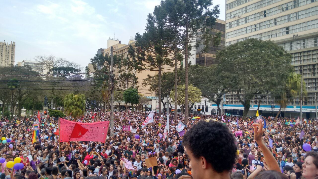 Foto tirada da frente do prédio histórico da UFPR na Praça Santos Andrade